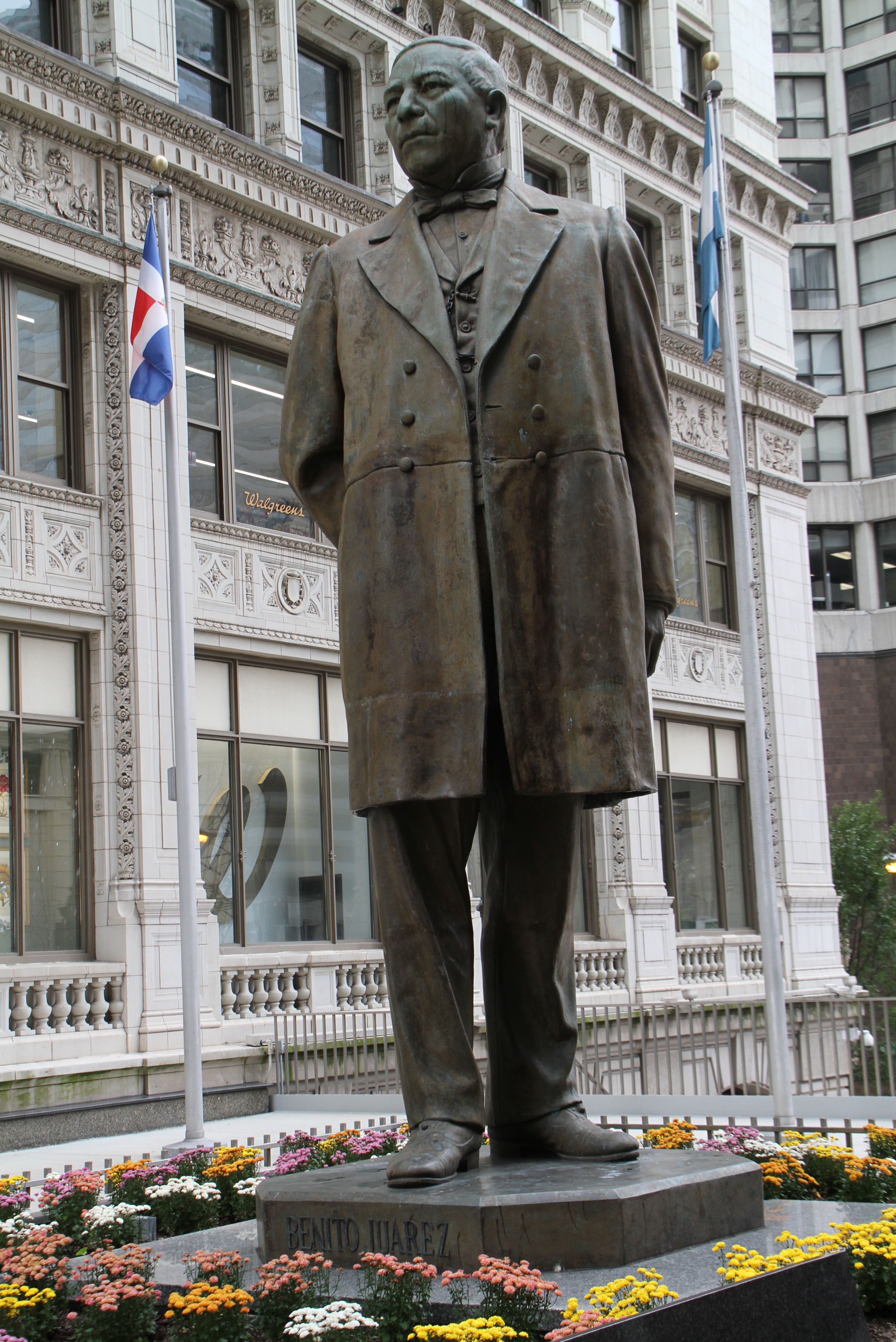 Geschenk Mexicos